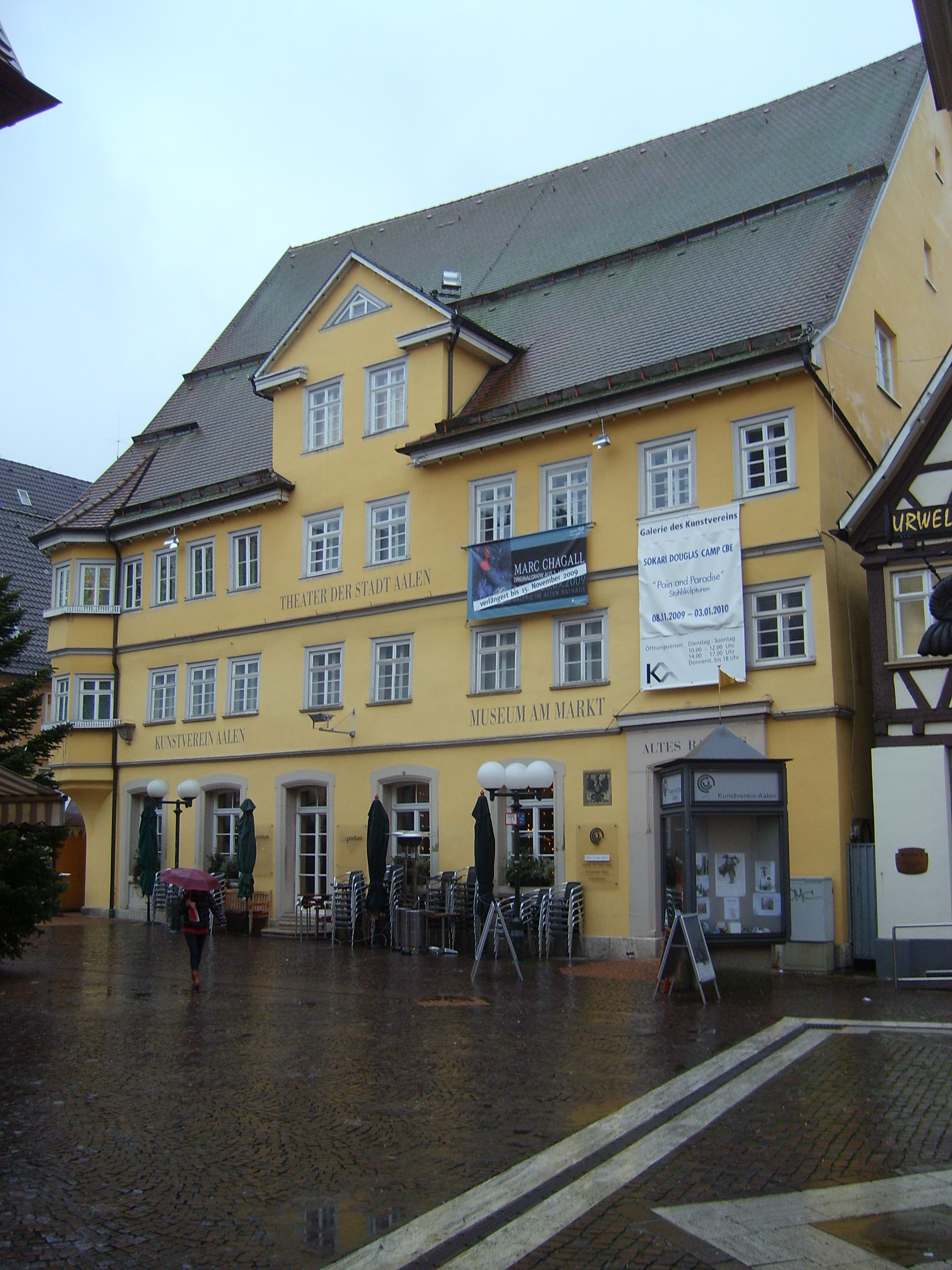 Altes Rathaus in Aalen